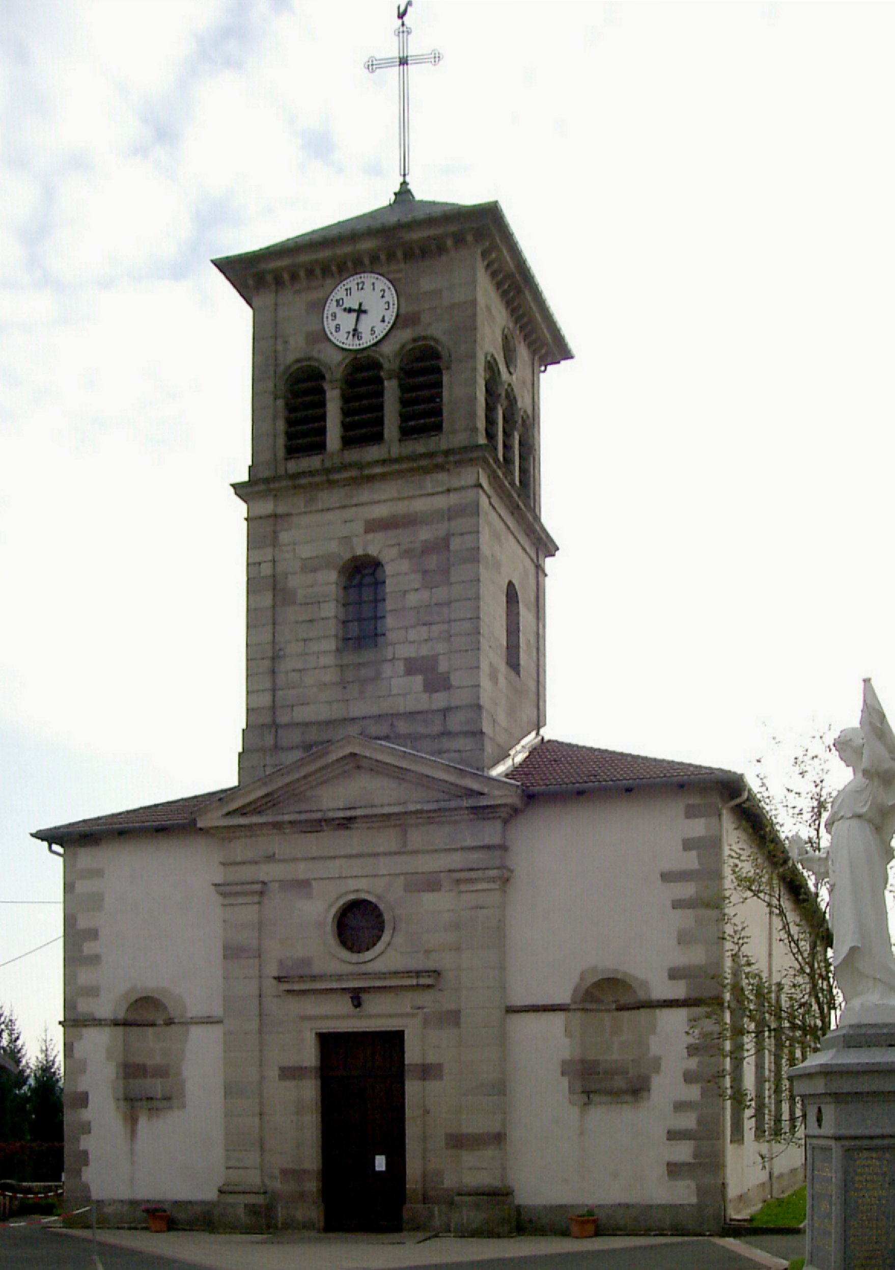 L'église Saint-Maurice à Clerjus